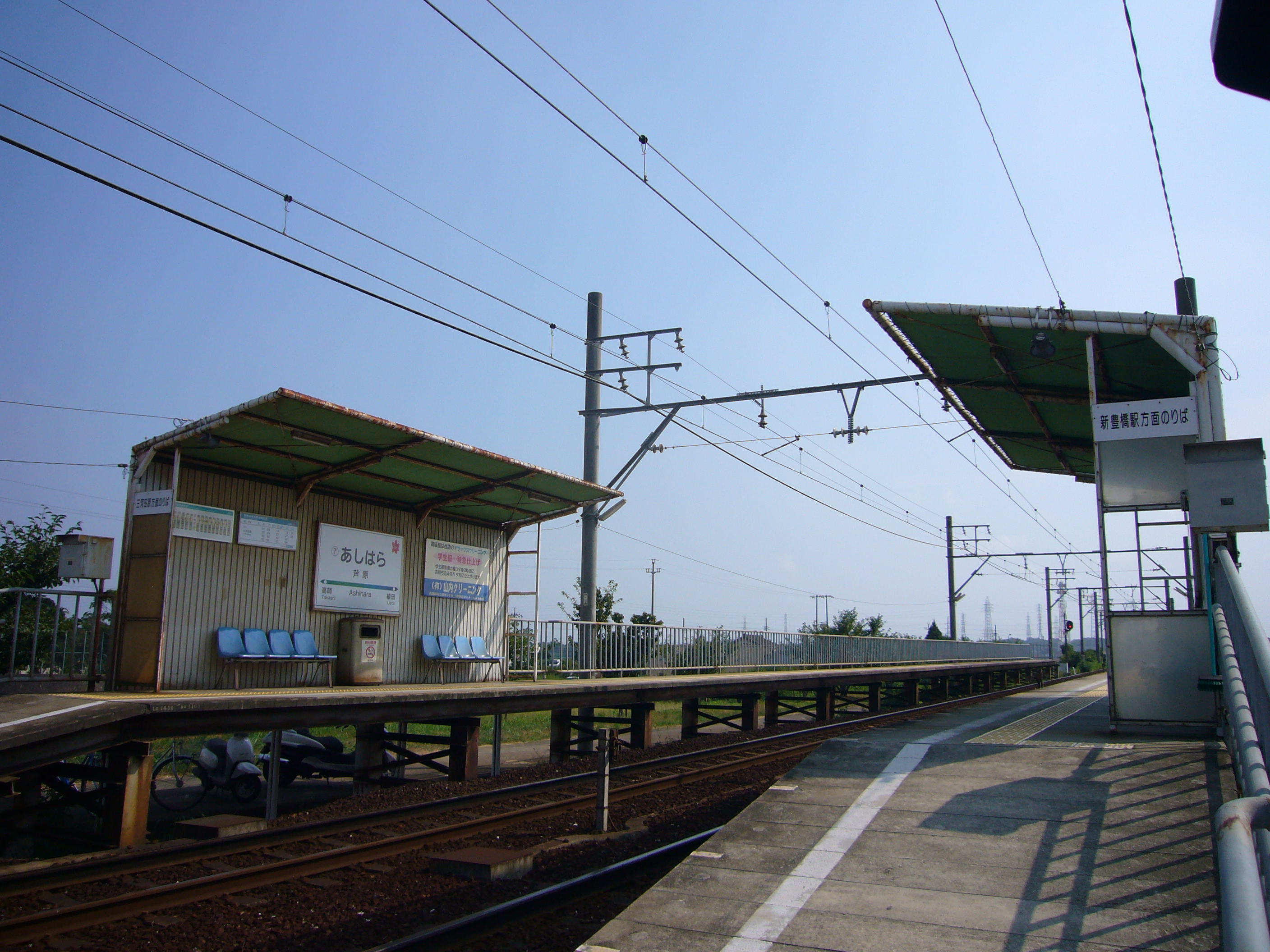 Ashihara Station, Toyohashi, Aichi, Japan